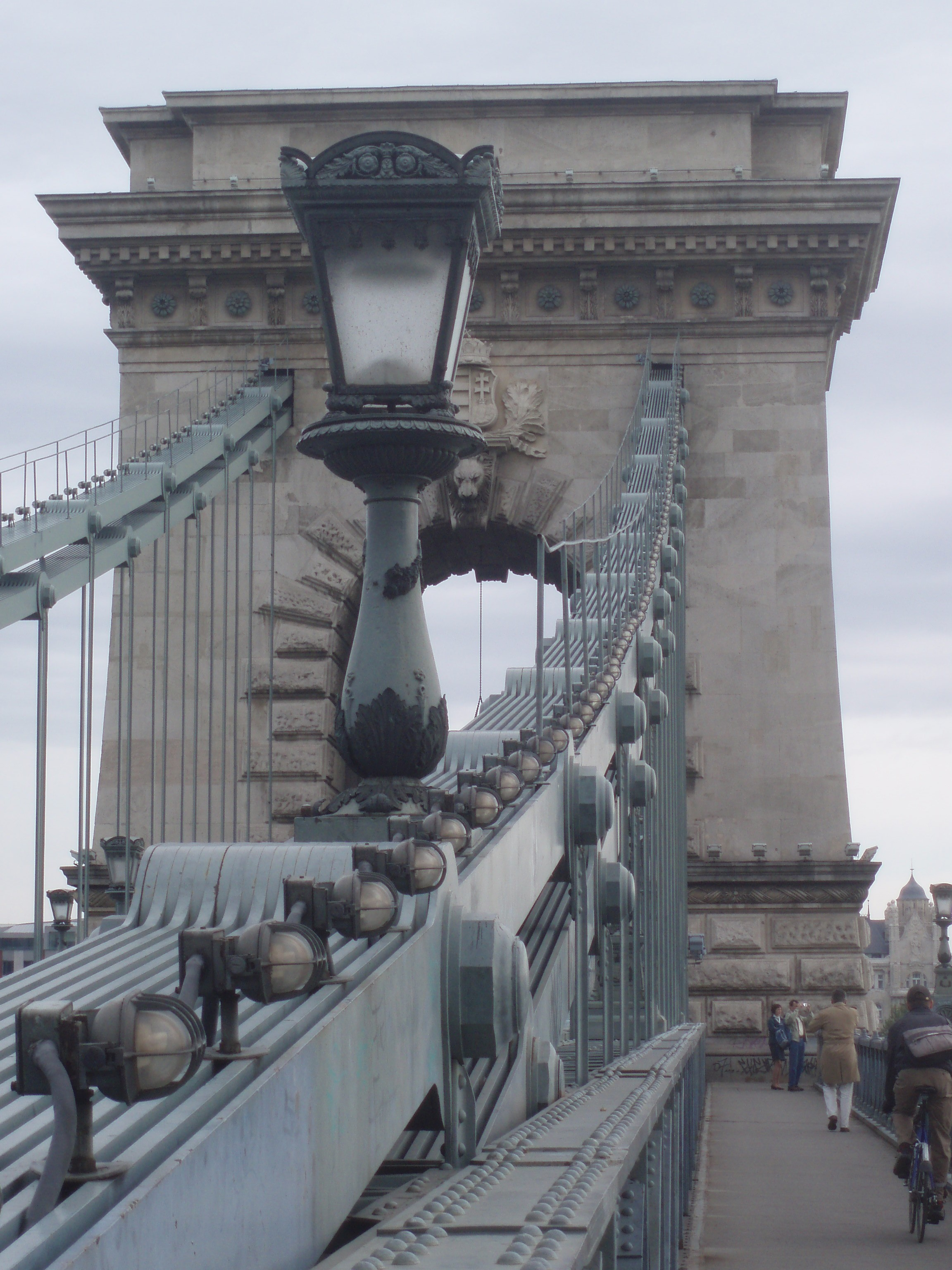 A Lánchíd budai oldalon álló pillére